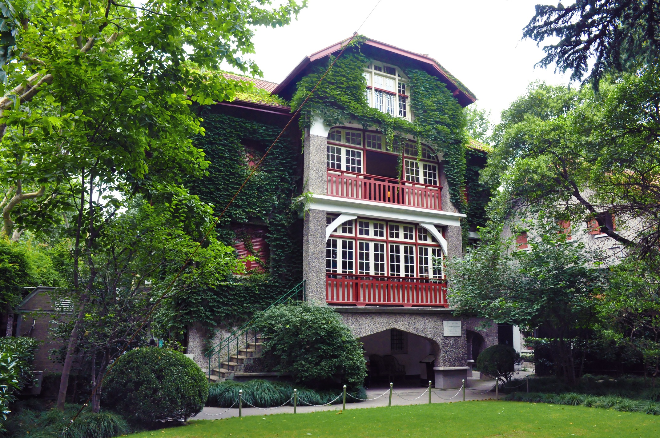 中国共产党代表团驻沪办事处（周公馆） 思南路73号